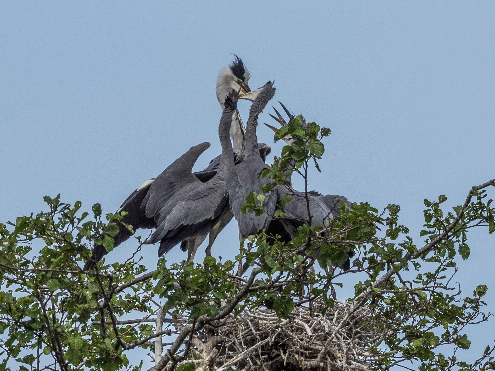 Ardea cinerea